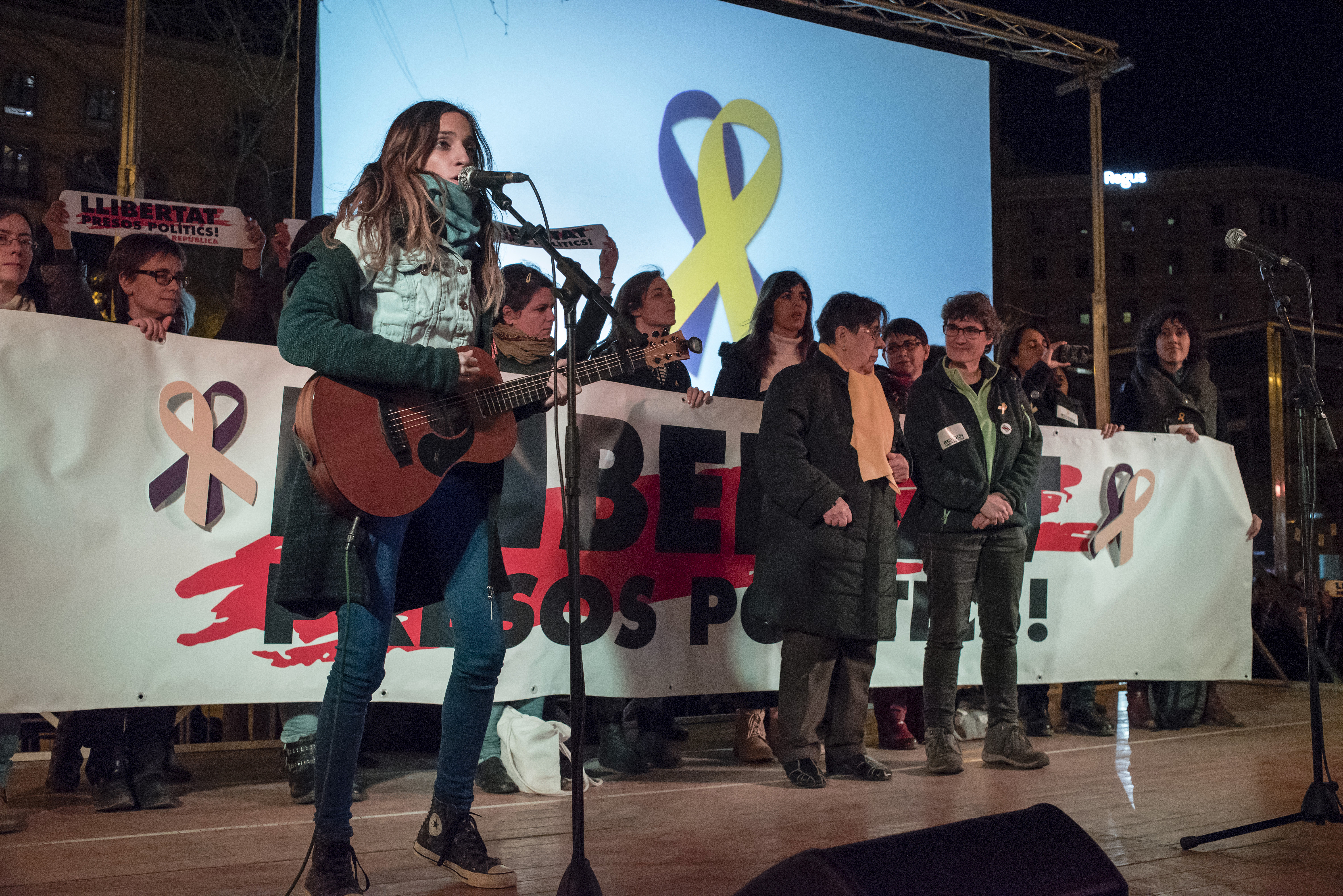 _DC69500